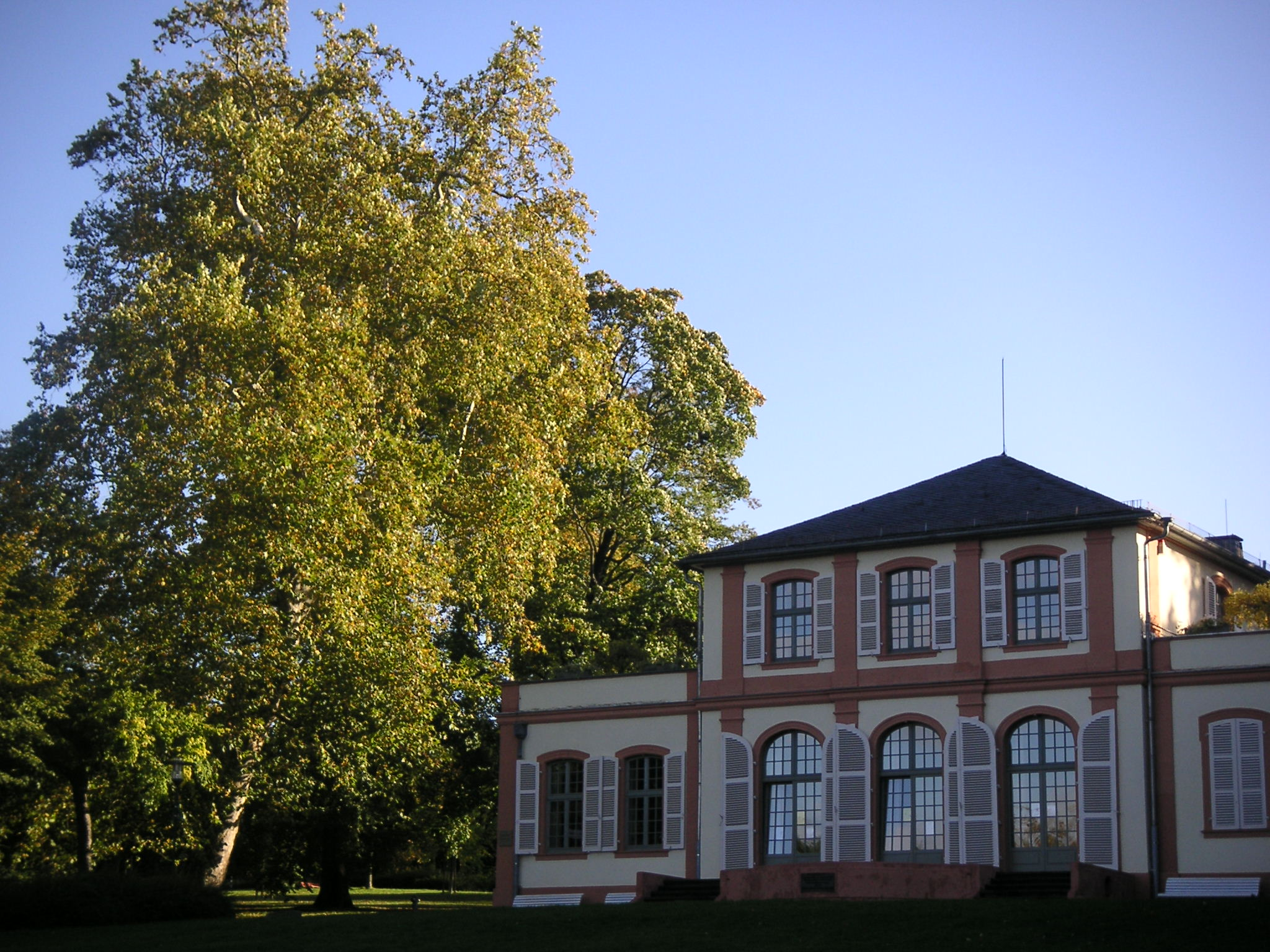 Prinz-Emil-Schlösschen in Darmstadt